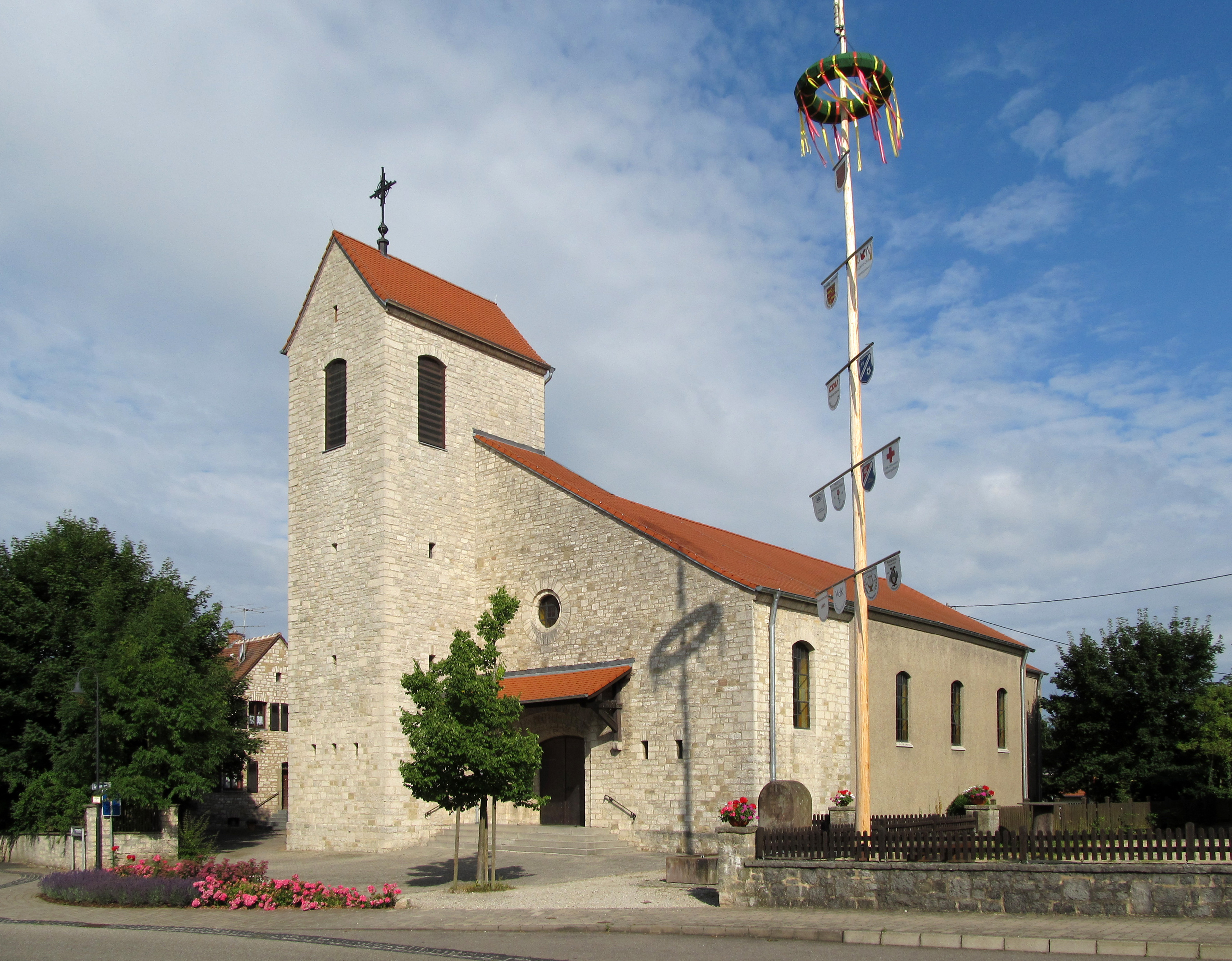 Die katholische Pfarrkirche "Bruder Klaus" in Niedergailbach, Gemeinde Gersheim, Saarland